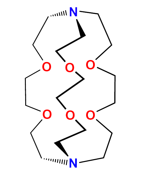 Wzór kryptandu